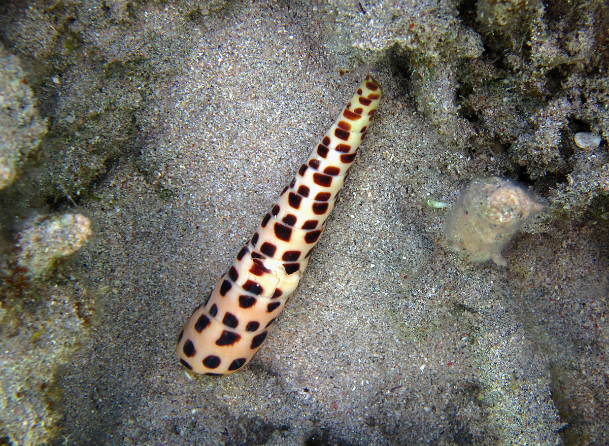 Le coquillage Terebra consobrina à la Réunion.